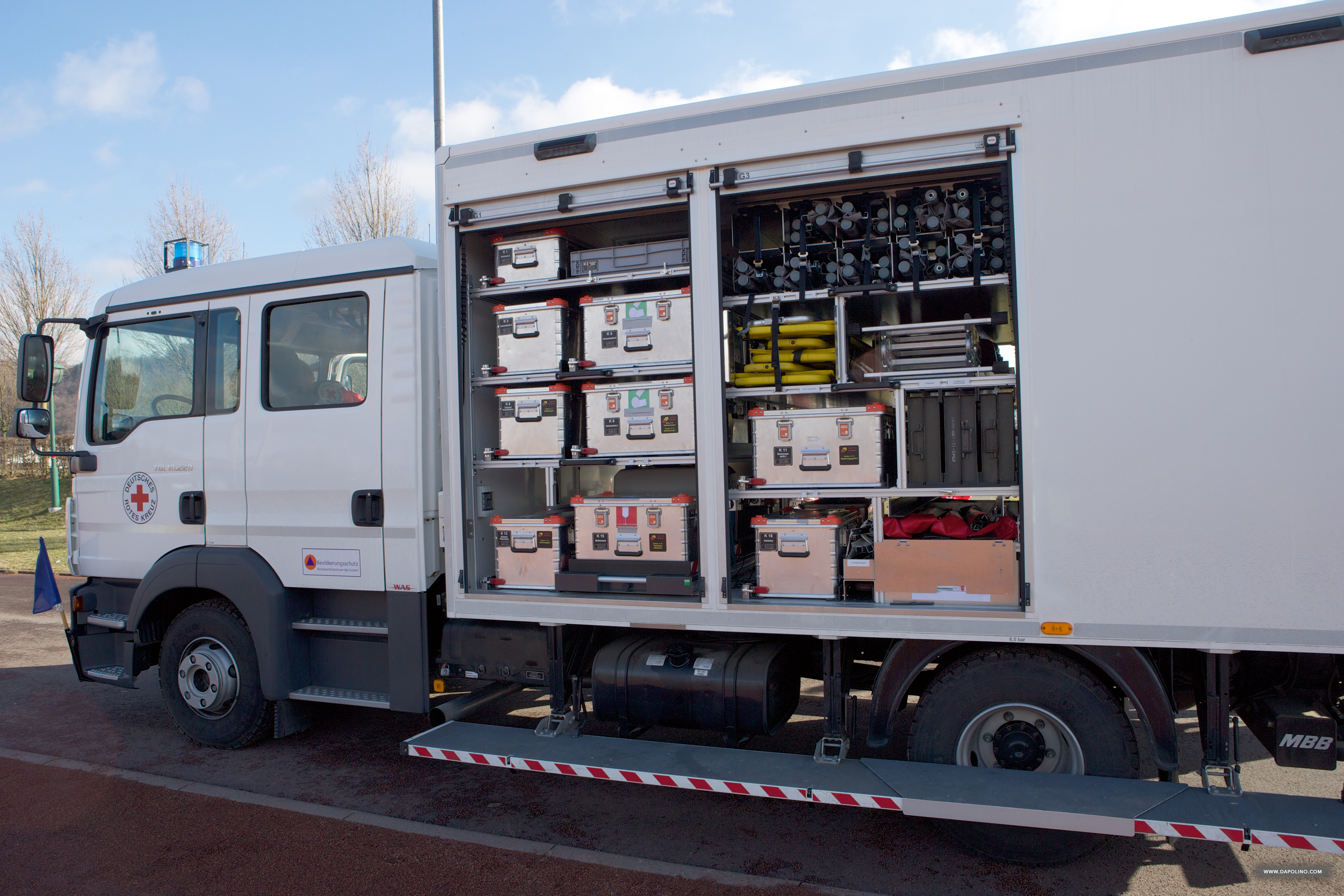 GW-SAN der MTF (Gerätewagen Sanitätsdienst der Medizinischen Task Force #1) Seitenansicht